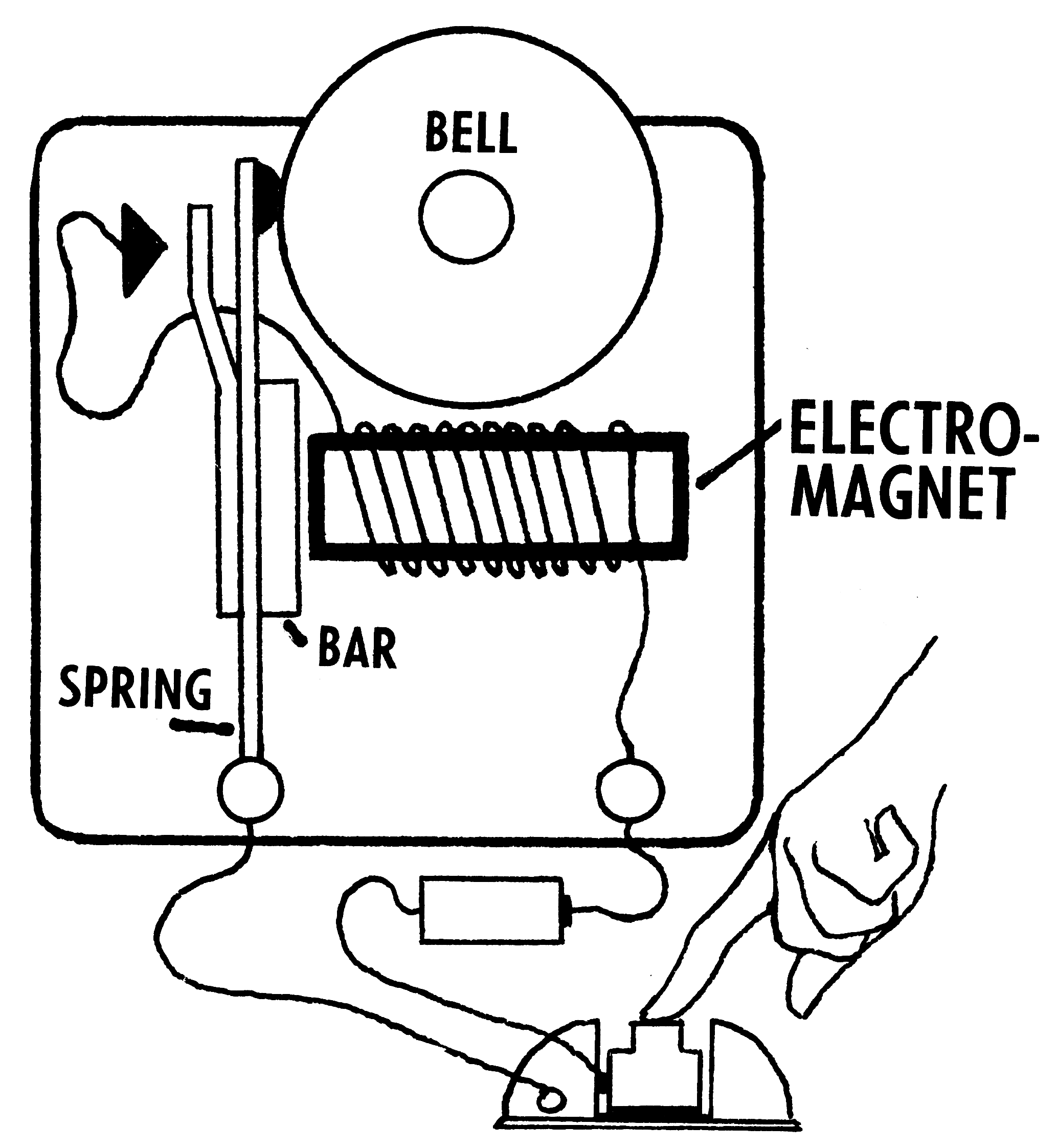 Electromagnet